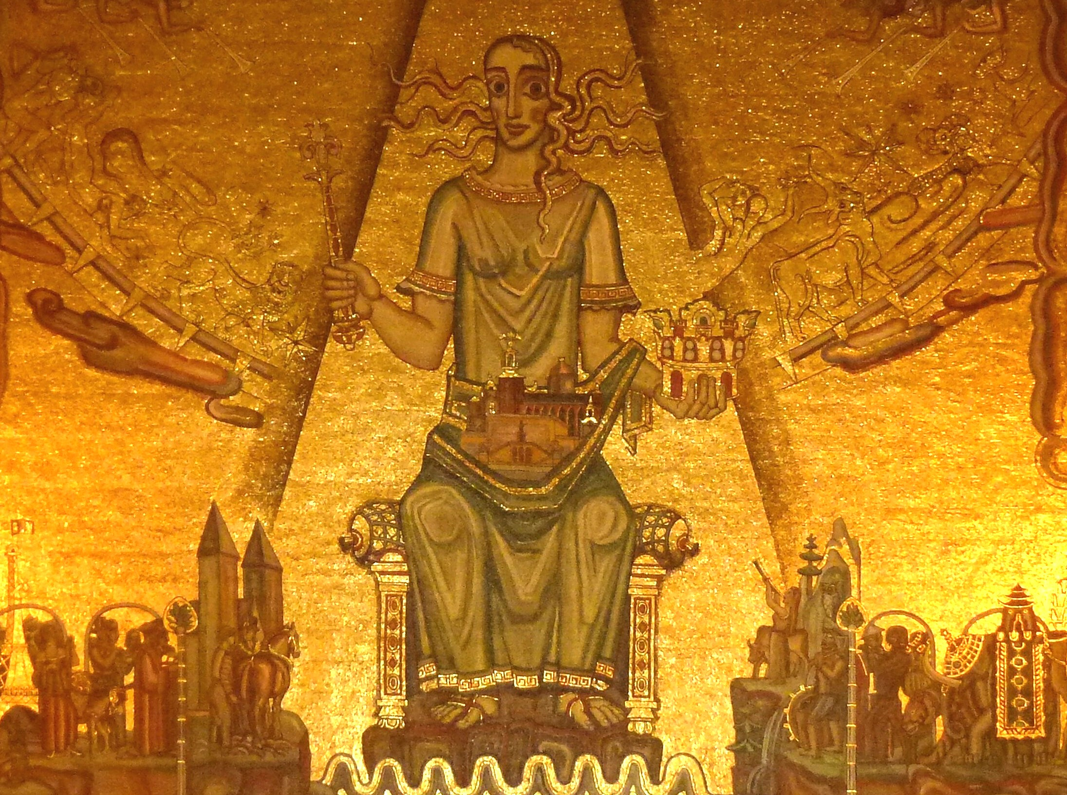 Gyllene salen Mälardrottningen detalj